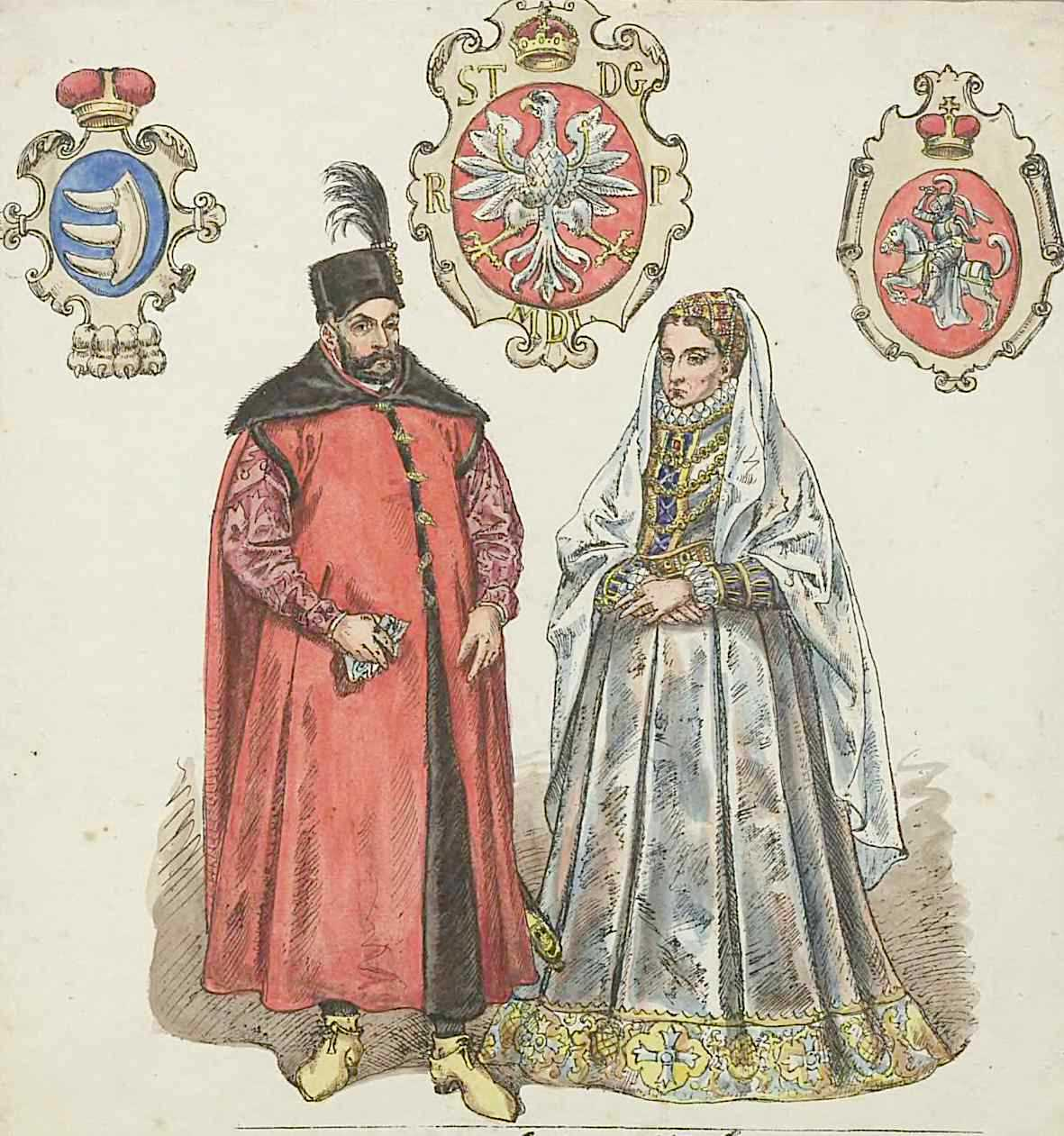 Stefan Batory (1533-1586) - książę siedmiogrodzki, król Polski i wielki książę litewski z żoną - Anną Jagiellonką (1523-1596). Władcy widoczni w całej postaci, król skierowany ¾ w prawą, królowa ¾ w lewą stronę. Powyżej pary królewskiej biały orzeł w kartuszu herbowym. W górnym lewym rogu herb Wilcze Zęby. W górnym prawym rogu herb Pogoń.